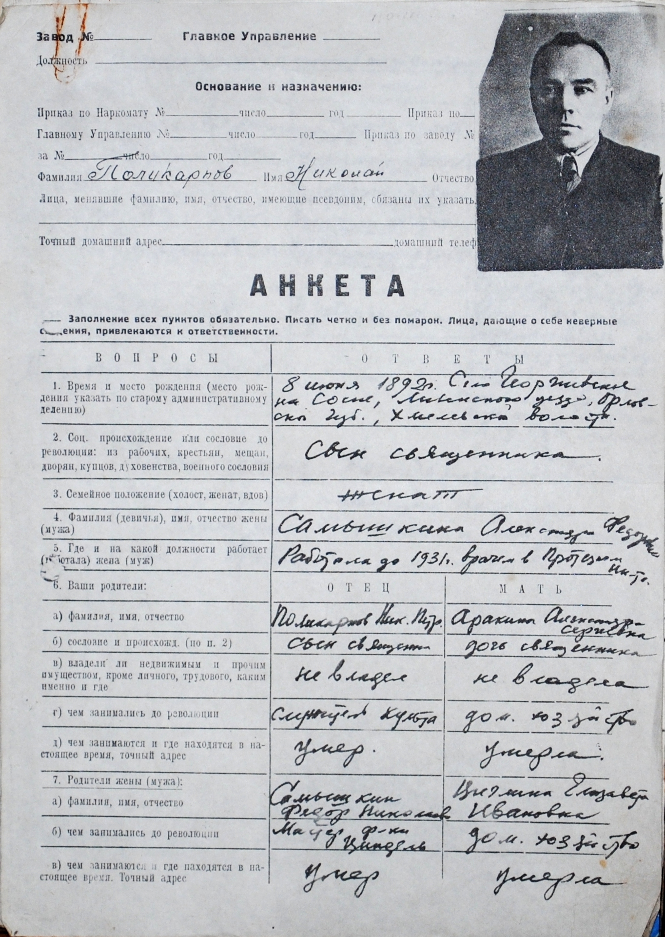 Документ Поликарпова